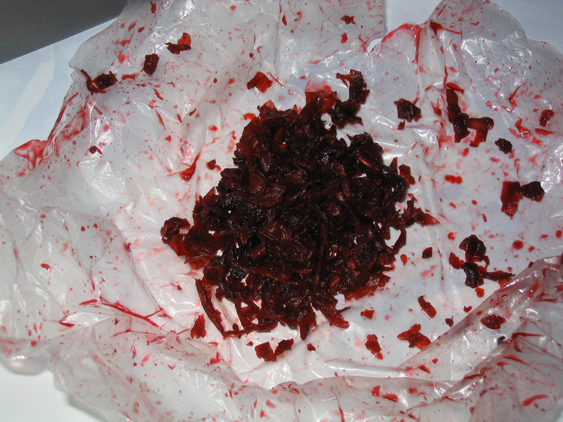 Das Bild zeigt feuchten Shisha Tabak, solch einen wie man ihn in allen Ländern außer Deutschland legal kaufen kann. Er besitzt einen hohen Prozentsatz an Feuchtigkeit. In Deutschland sind jedoch maximal nur 5% Tabakfeuchtigkeit erhältlich.